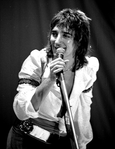 Rod Stewart, Ekeberghallen, Oslo, Norway